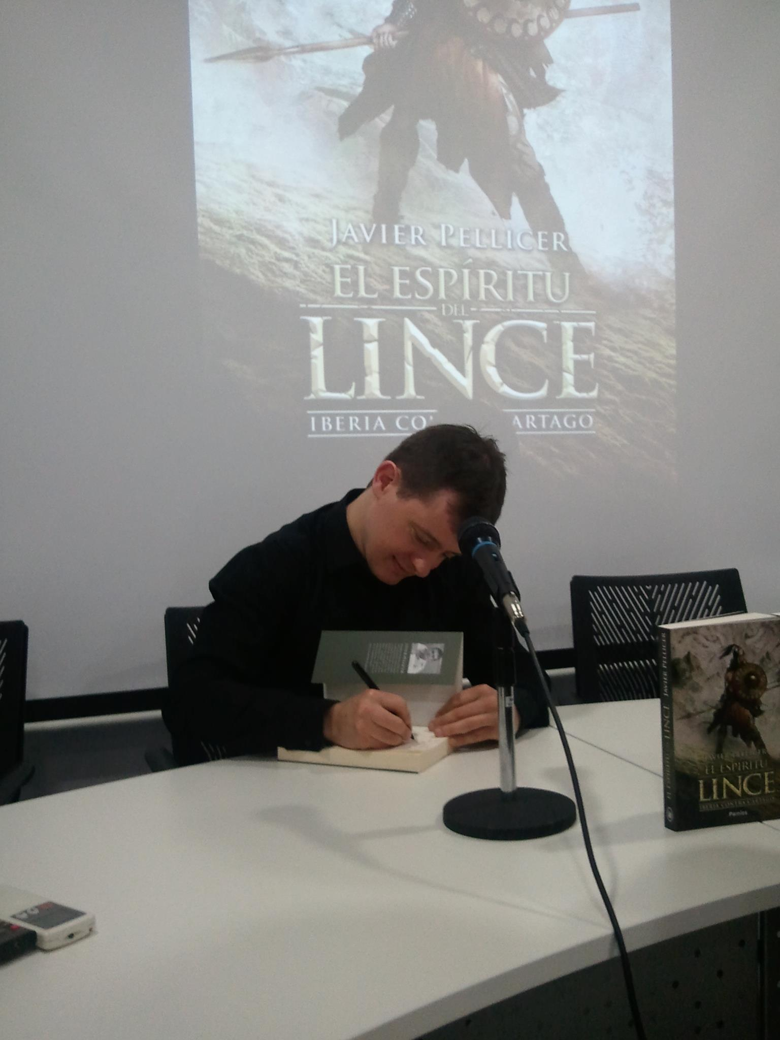 Presentación de la novela "El espíritu del lince" de Javier Pellicer en Benigánim.